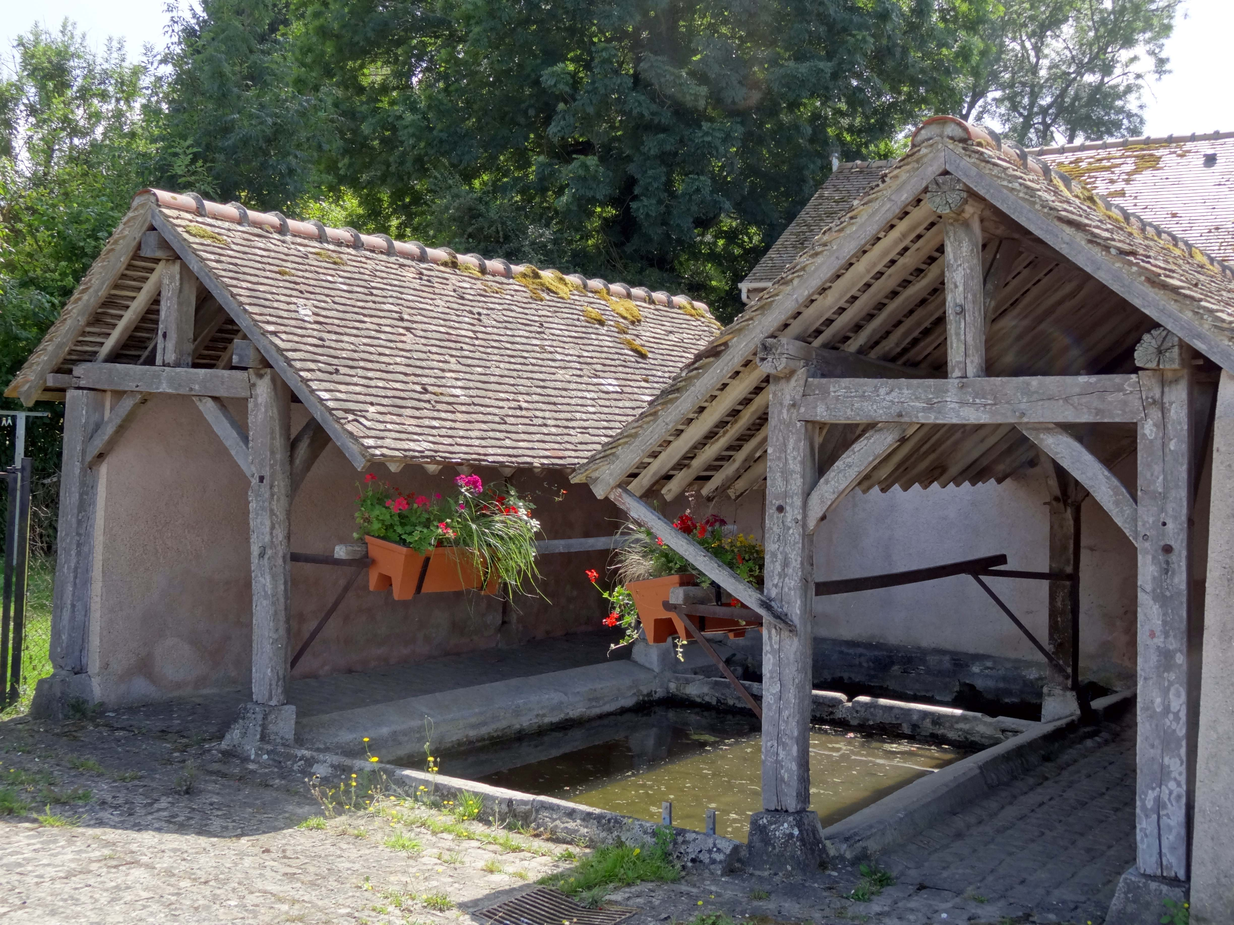 Saint-Clair-sur-Epte - voir titre.